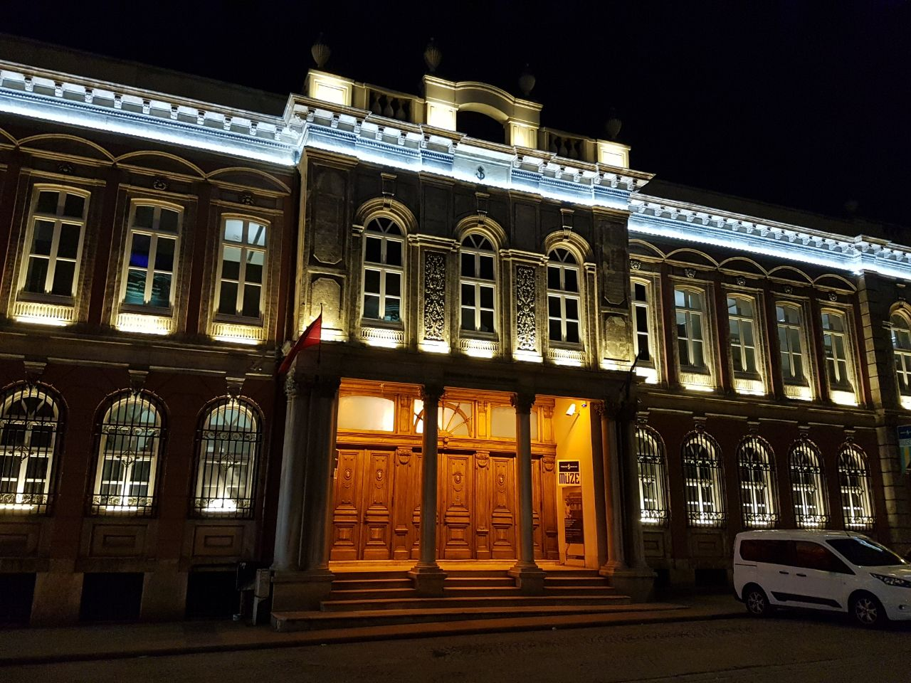 Türkiye İş Bankası Müzesi, 2017 Ramazan